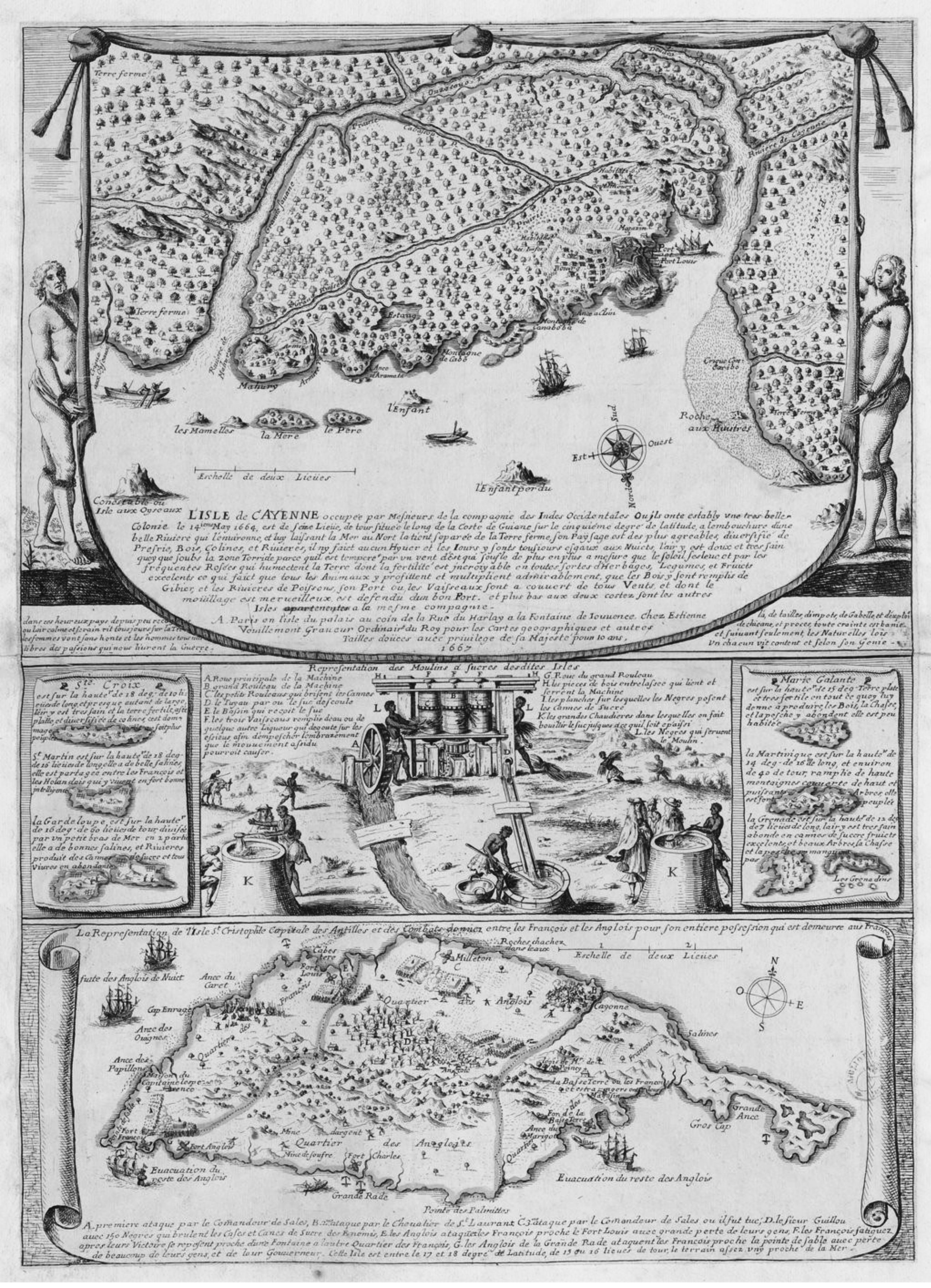 Document cartographique, Échelles diverses : Isle de Cayenne. Représentation de l'Isle St Christophe Capitale des Antilles et des combats donnez entre les François et les Anglois pour son entière possession qui est demeurée aux François Le feuillet est organisée en trois parties : Dans la partie supérieure : "L'Isle de Cayenne" Cette carte est sur un cartouche en forme de draperie présentée par un couple d'Indiens. Dans la partie centrale : "Representation des Moulins à sucres desdites isles", avec en cartouche de chaque côté, à gauche : îles Ste Croix, St Martin, et la Guadeloupe, à droite : Marie-Galante, la Martinique, et la Grenade. Dans la partie inférieure, dans un cartouche en forme de parchemin : "La Représentation de l'Isle St Christophe Capitale des Antilles et des combats donnez entre les François et les Anglois pour son entière possession qui est demeurée aux François"